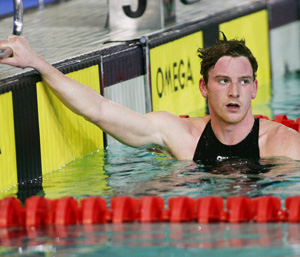 Rivera Son Hugo 2008 1500 libres